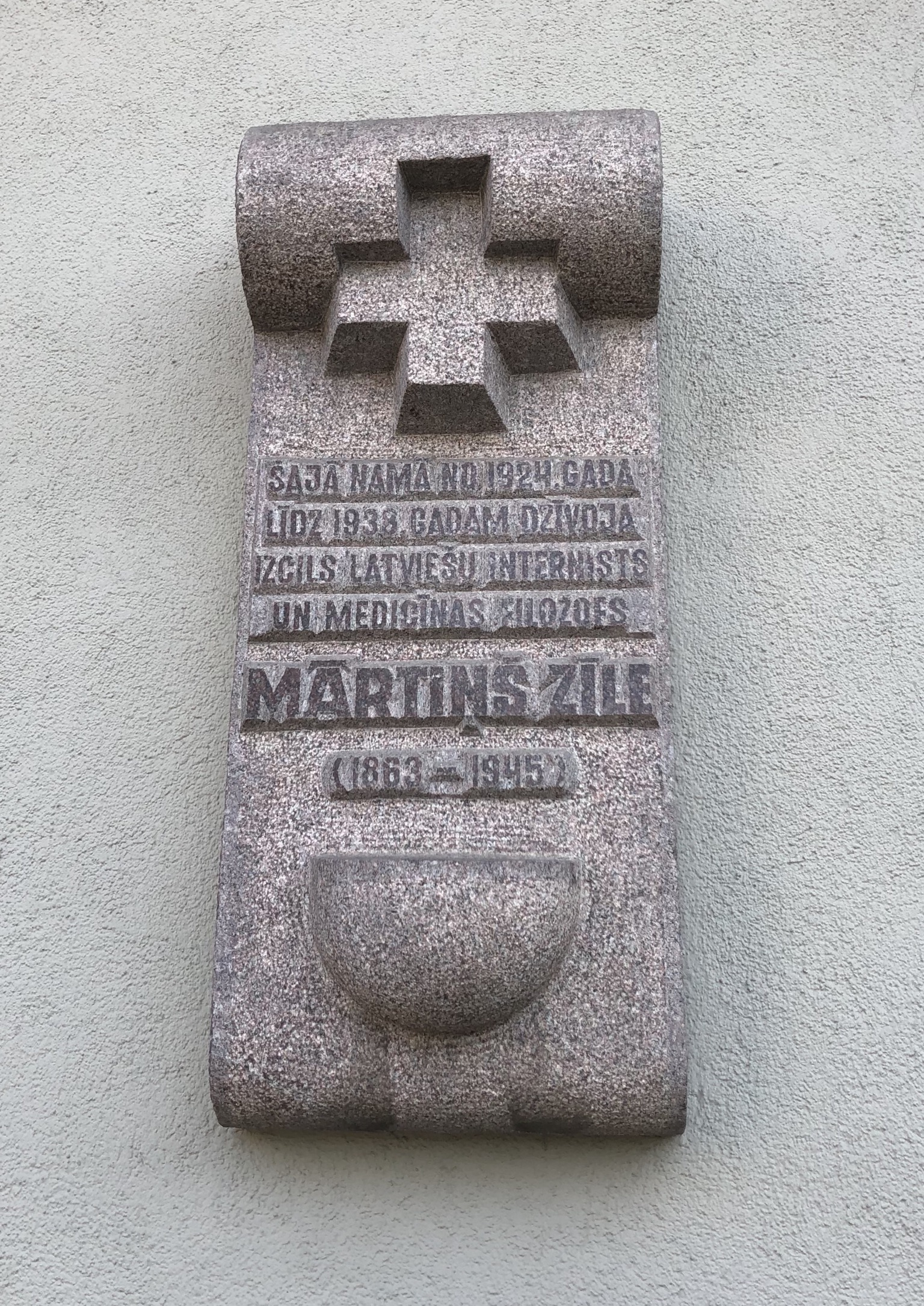 Gedenktafel für Martins Zile in Riga